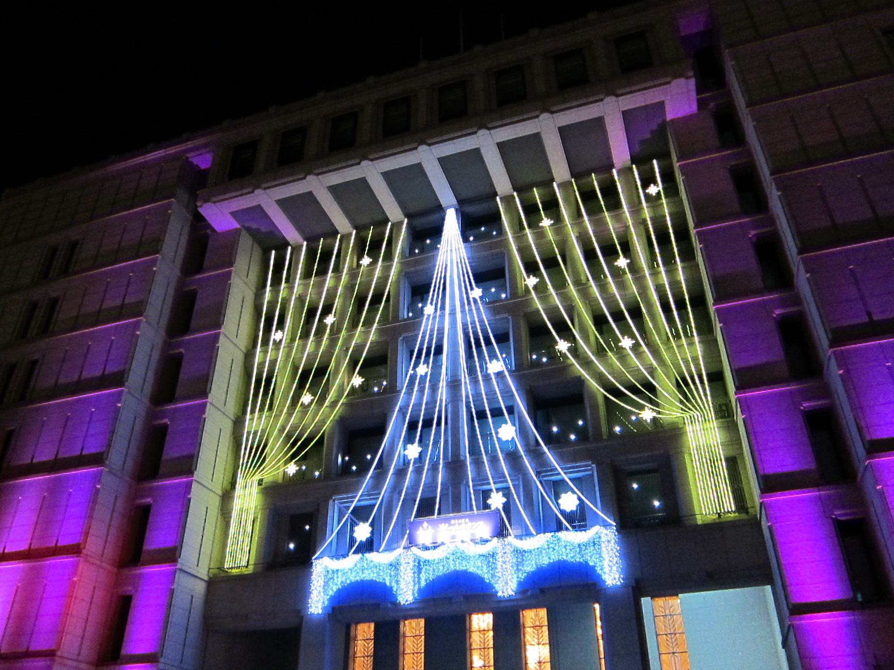 The OSAKA Hikari-Renaissance (大阪光のルネサンス) at Osaka City, Japan.